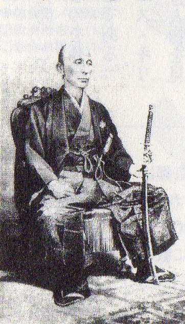 日本で二番目にプロテスタントの洗礼を受けた佐賀藩家老村田政矩